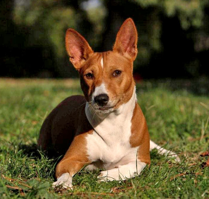 Roma: figlia di Betty & Pablito di Napoli Basenji